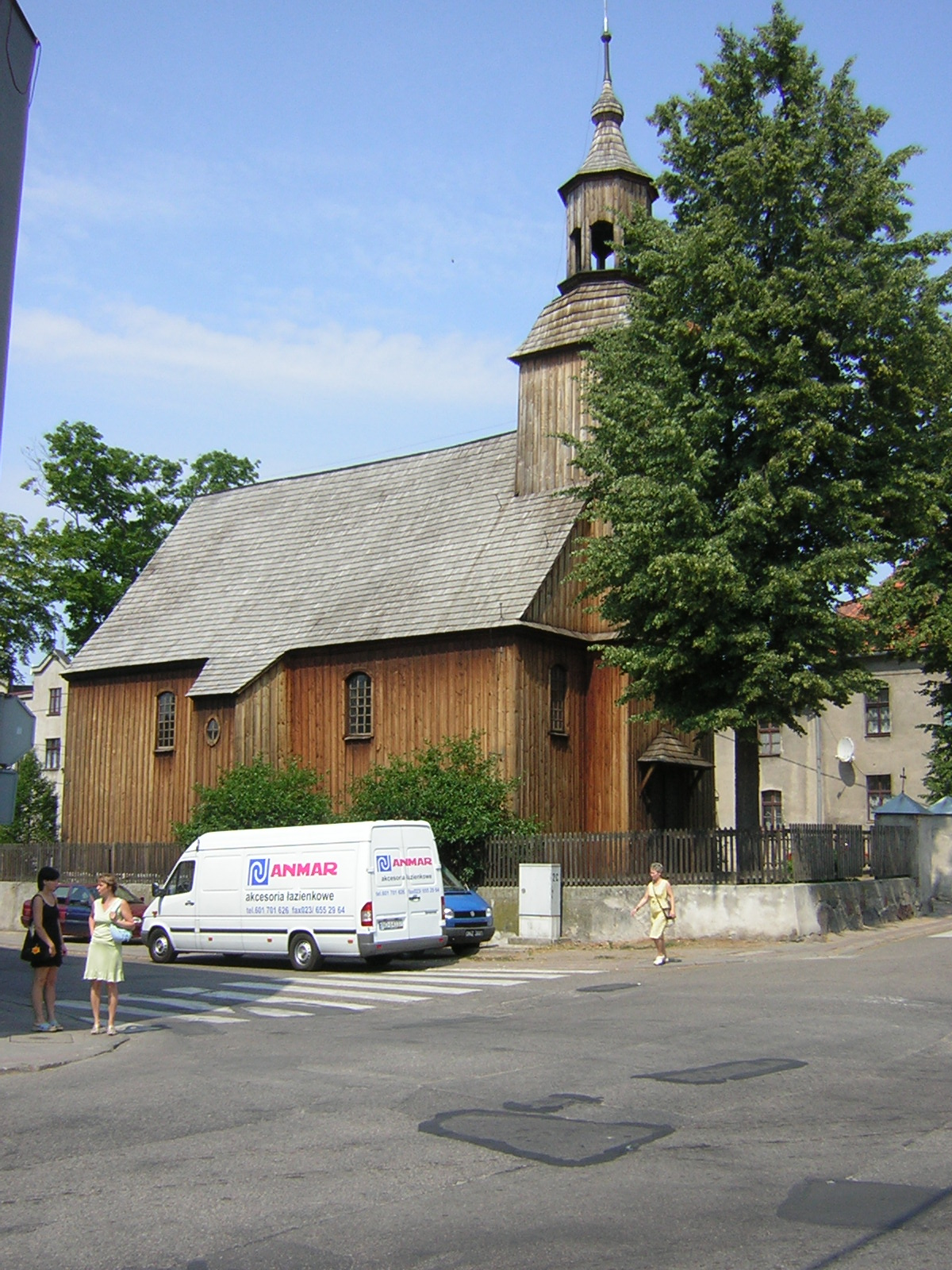 Kościół p.w. św. Barbary w Lubawie (zabytek nr rejestr. A-119) Author: Marcin n MARCIN N 13:22, 11 July 2006 (UTC)